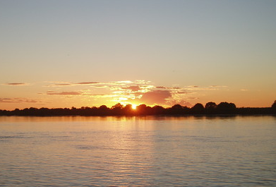 O pôr do sol na cidade,um dos mais exuberant do vale do São Francisco